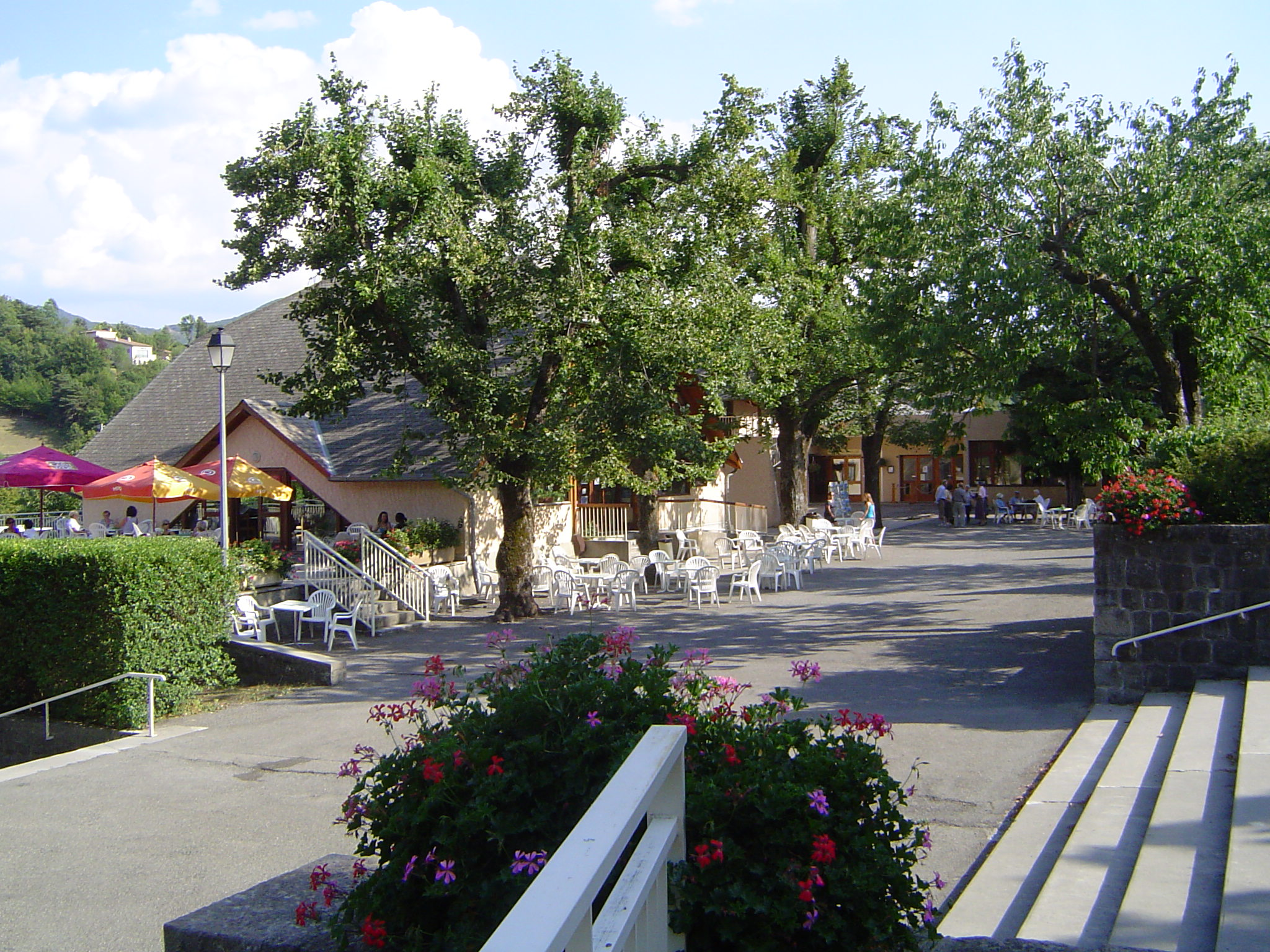 Photo prise à Notre-Dame-du-Laus